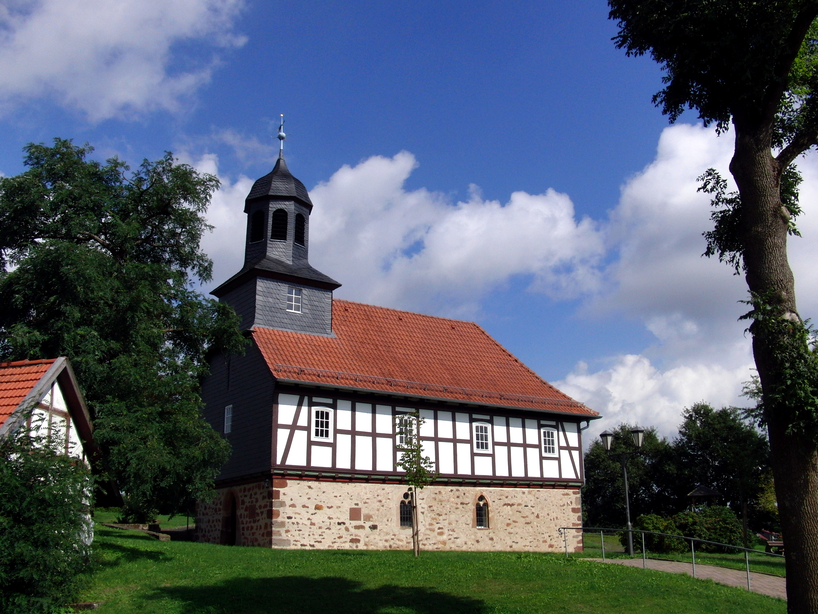 Kirche in Florshain, Schwalmstadt(Hessen)